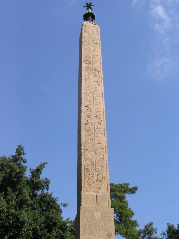 Beschreibung: Antinous-Obelisk auf dem Pincio in Rom; Quelle: selbst fotografiert am 6.9.2004, frei für alle und jeden Fotograf oder Zeichner: Maus-Trauden